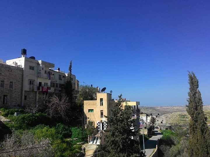 المدخل الشرقي الرئيسي للحارة